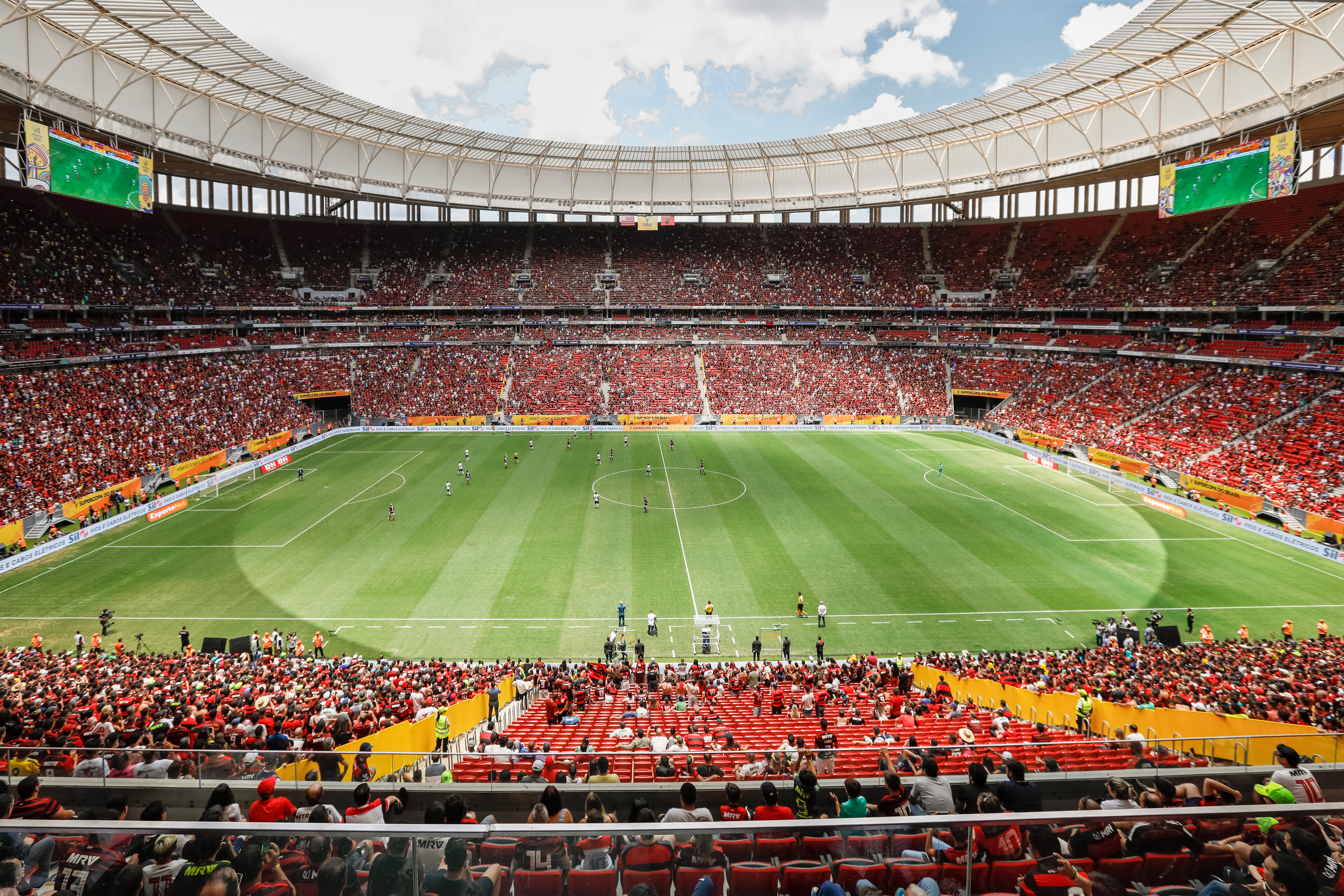 (Brasília - DF, 16/02/2020) Jogo Flamengo x Atlético PR. Foto: Carolina Antunes/PR